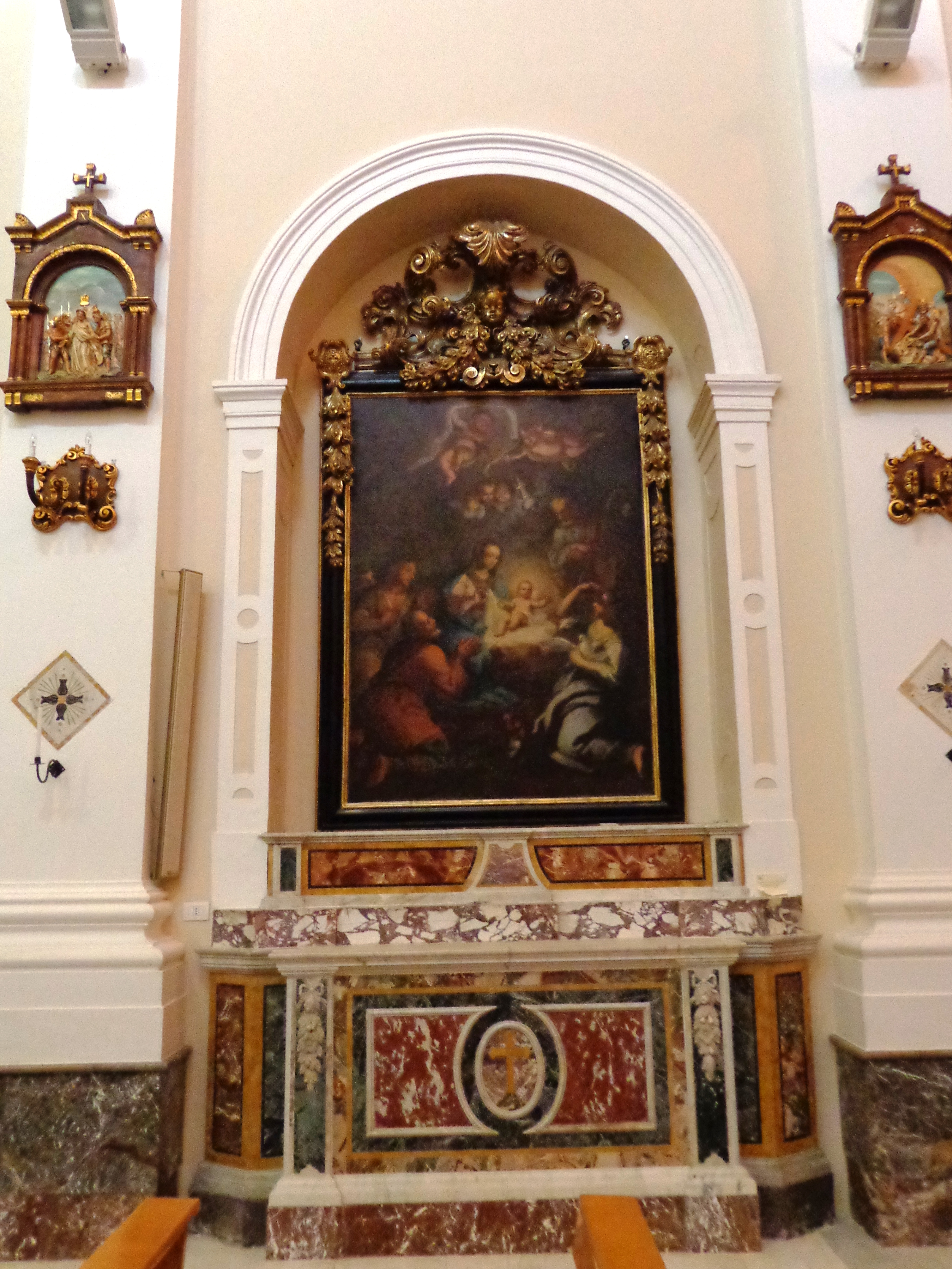 Cattedrale Patti 11